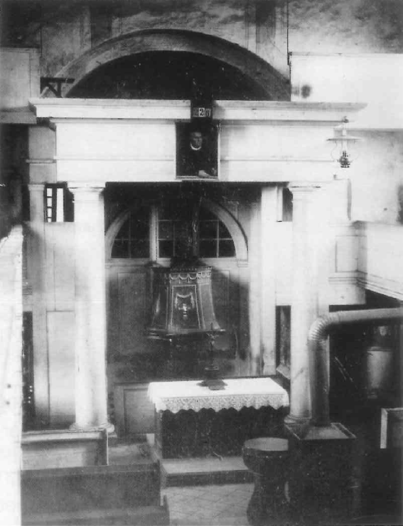 Evangelische Kirche Großen-Linden, Landkreis Gießen, Hessen, Deutschland